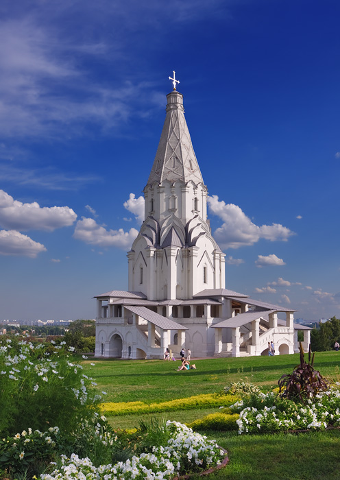 Церковь Вознесения Господня в Коломенском (Москва и Московская область, Москва, Андропова проспект, 39, строение 1)